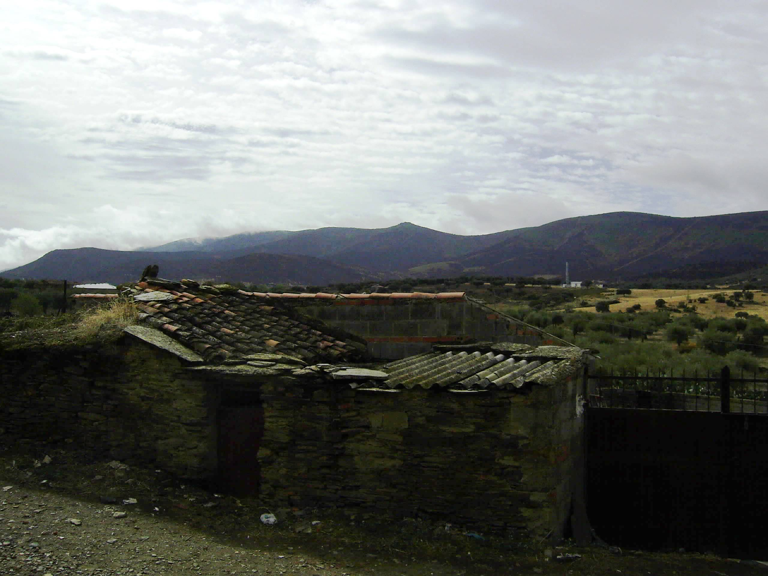 Sierra de Altamira, vista desde Carrascalejo